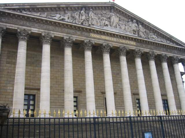 Assemblée Nationale Francaise à Paris bloublou